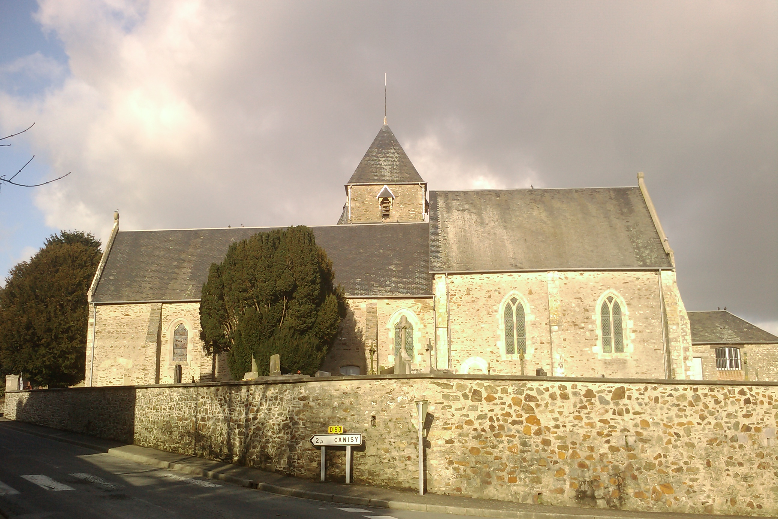 Église Saint-Ébremond de Saint-Ébremond-de-Bonfossé